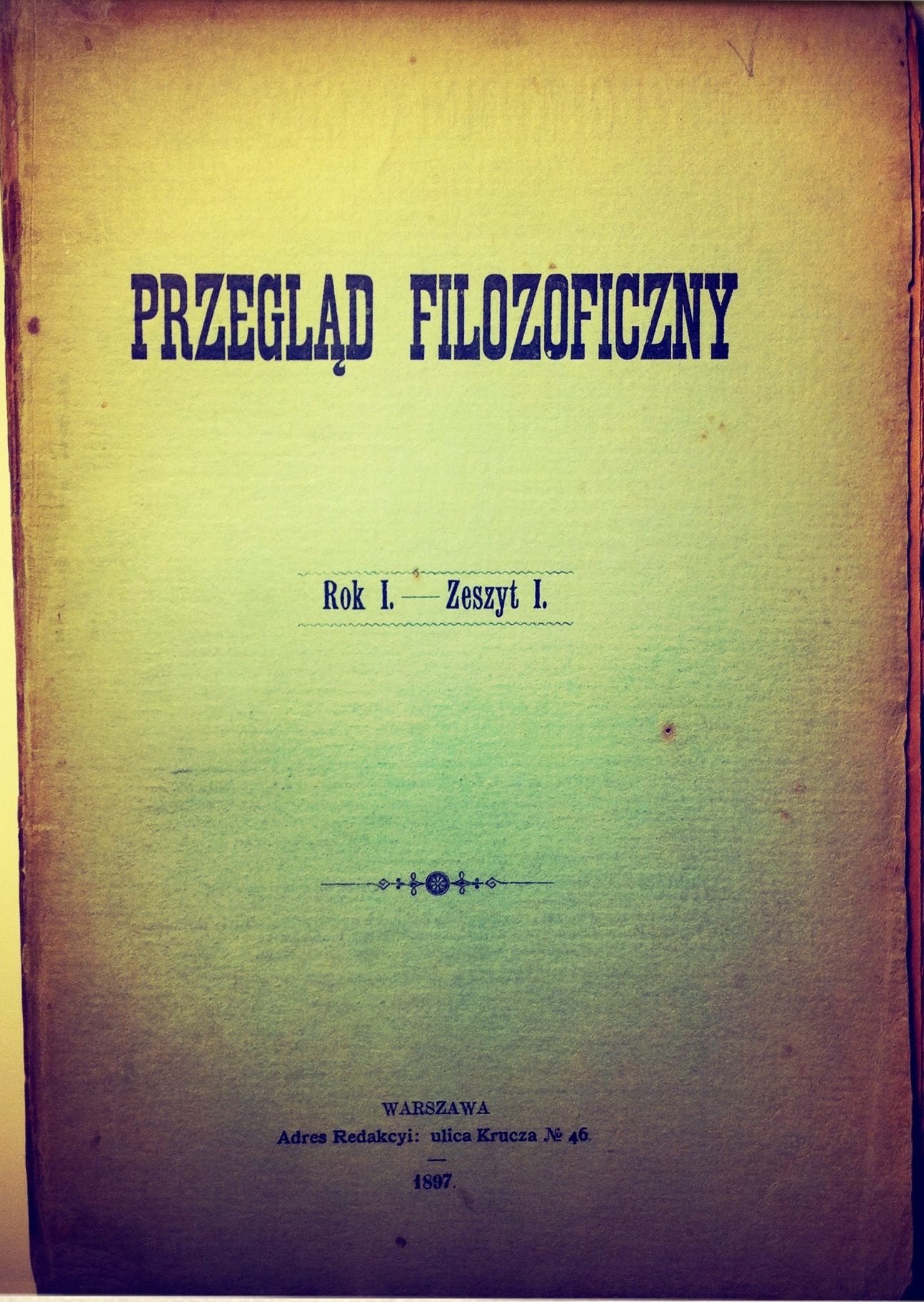 Pierwszy zeszyt "Przeglądu Filozoficznego".